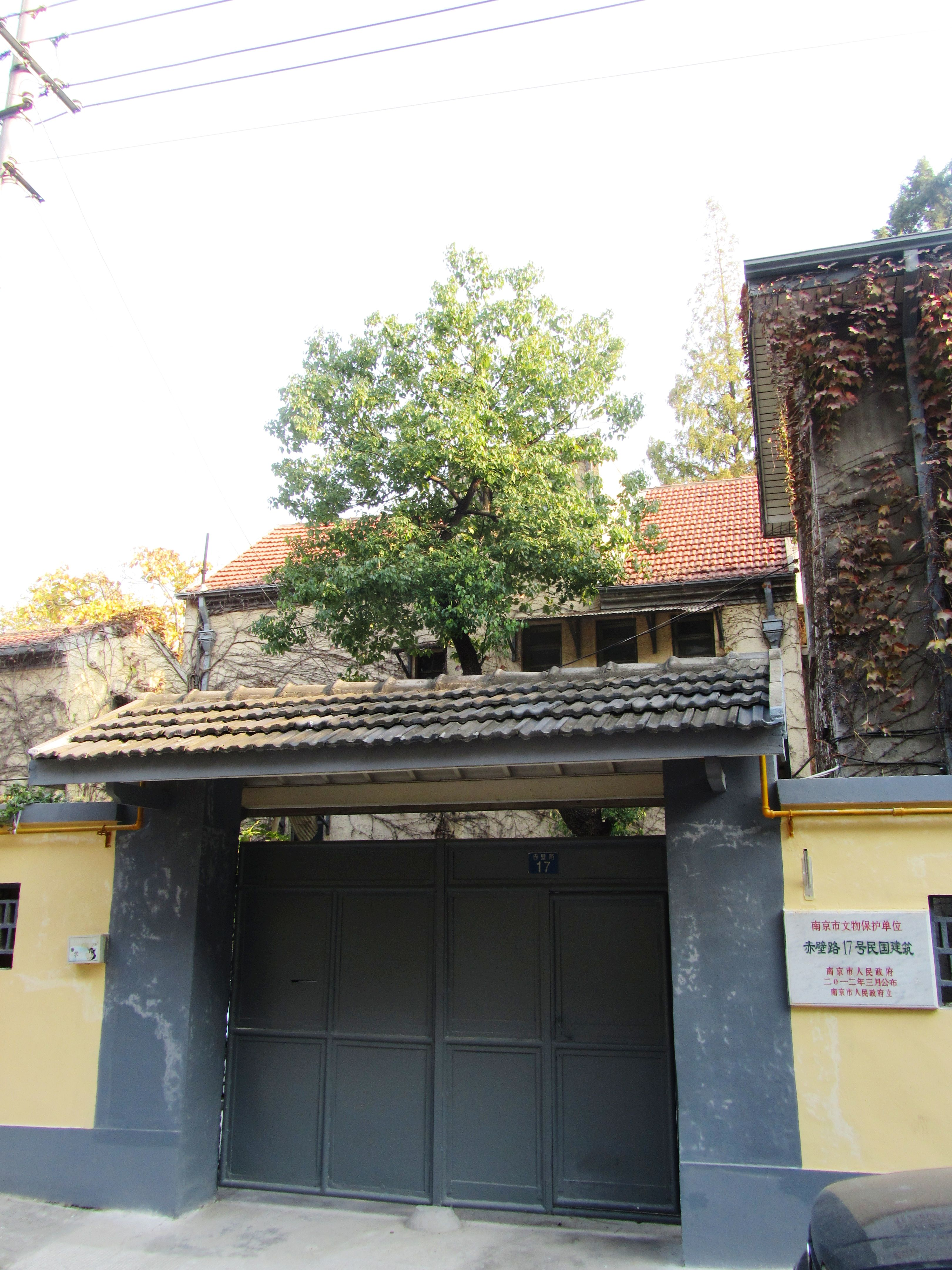 颐和路公馆区——赤壁路17号民国建筑，朱家骅旧居。